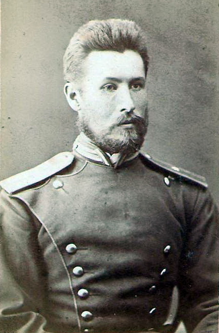 Генерал-майор Александр Фёдорович Грушецкий (р. 1854). Фото около 1890.